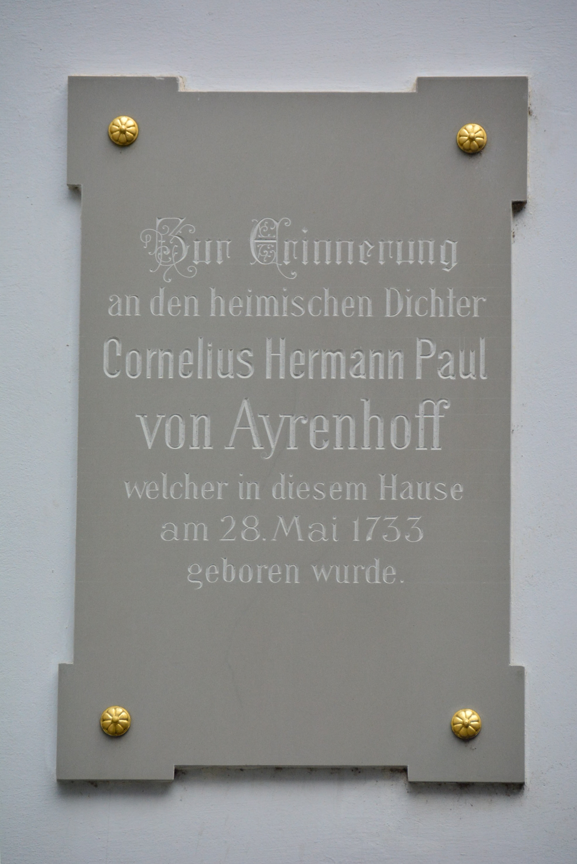 Gedenktafel für Cornelius Hermann von Ayrenhoff (Wien, Singerstraße 7)